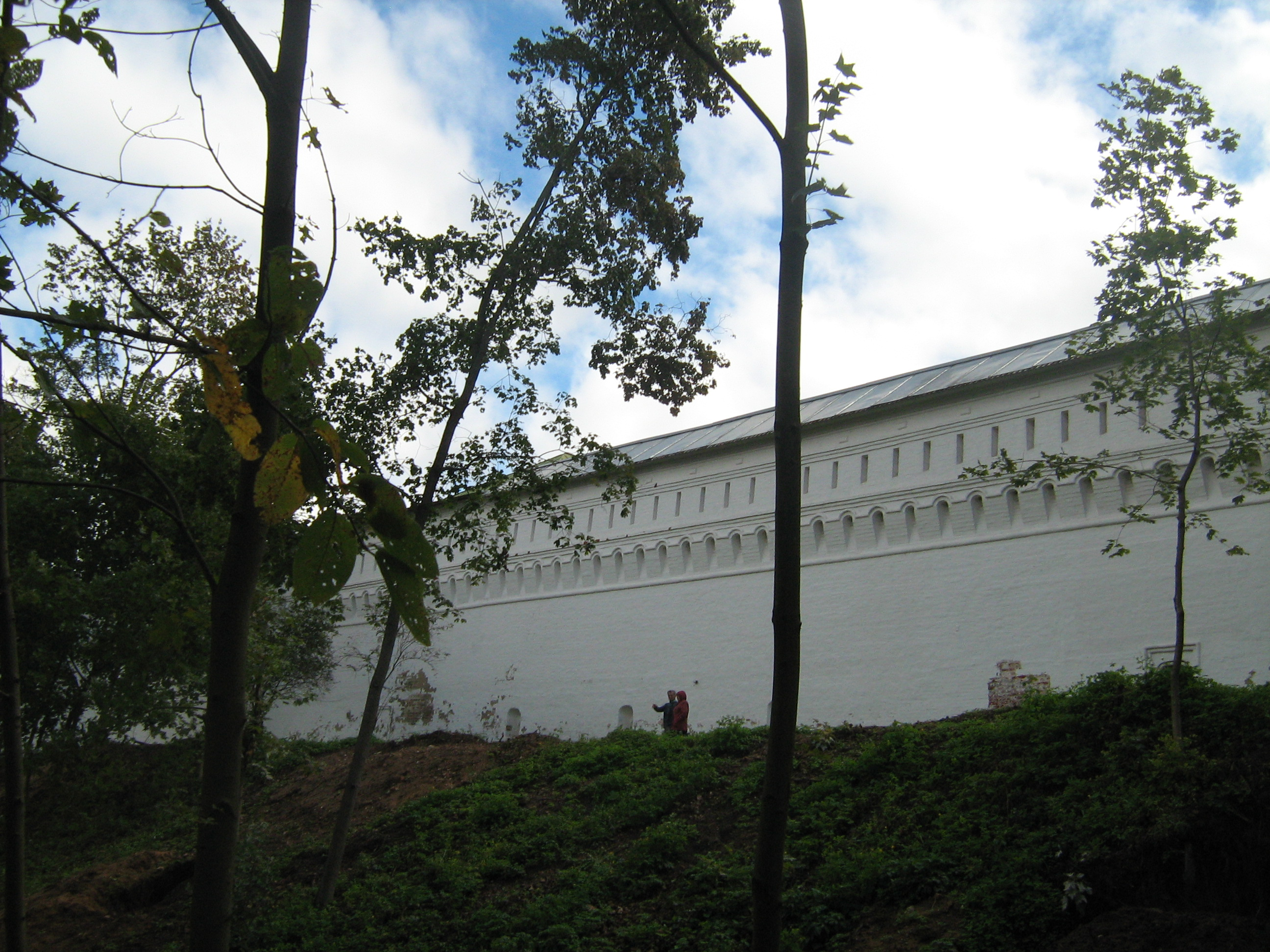 Крепостная стена Новоиерусалимского монастыря. Западное прясло. Вид снаружи